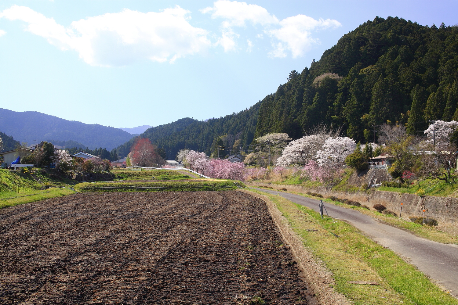 下津具の風景（北設楽郡設楽町津具、2017年（平成29年）4月）